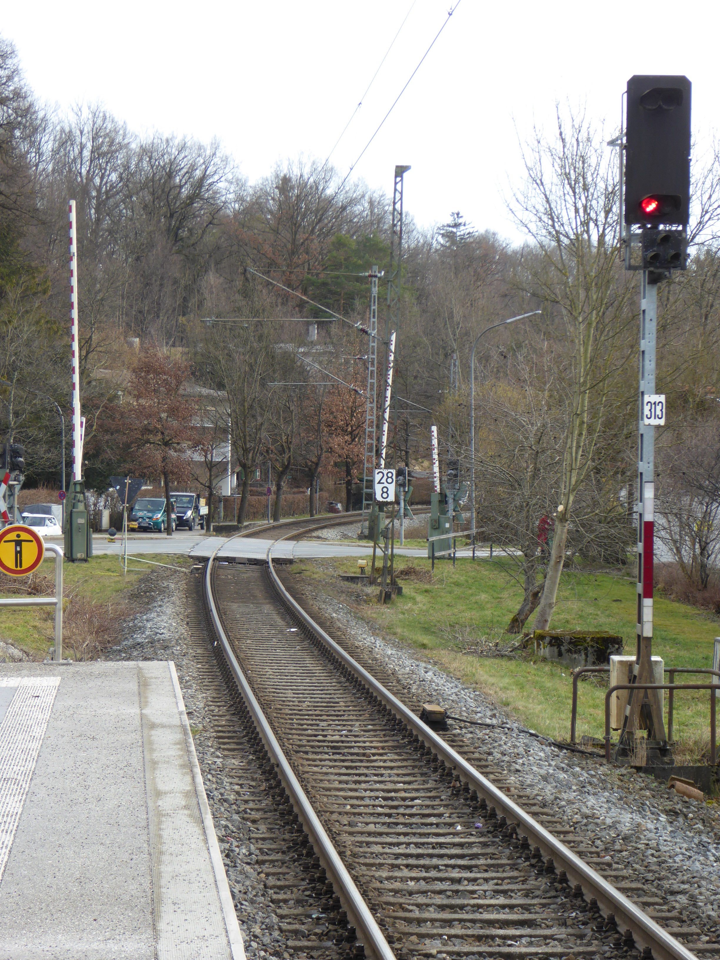 Blocksignal und Bahnübergang an der Mangfalltalbahn östlich der Haltestelle Bad Aibling Kurpark bei Streckenkilometer 28,8. Die eingleisige Strecke in Richtung Kolbermoor war im Februar 2016 nach einem schweren Eisenbahnunfall vorübergehend gesperrt.